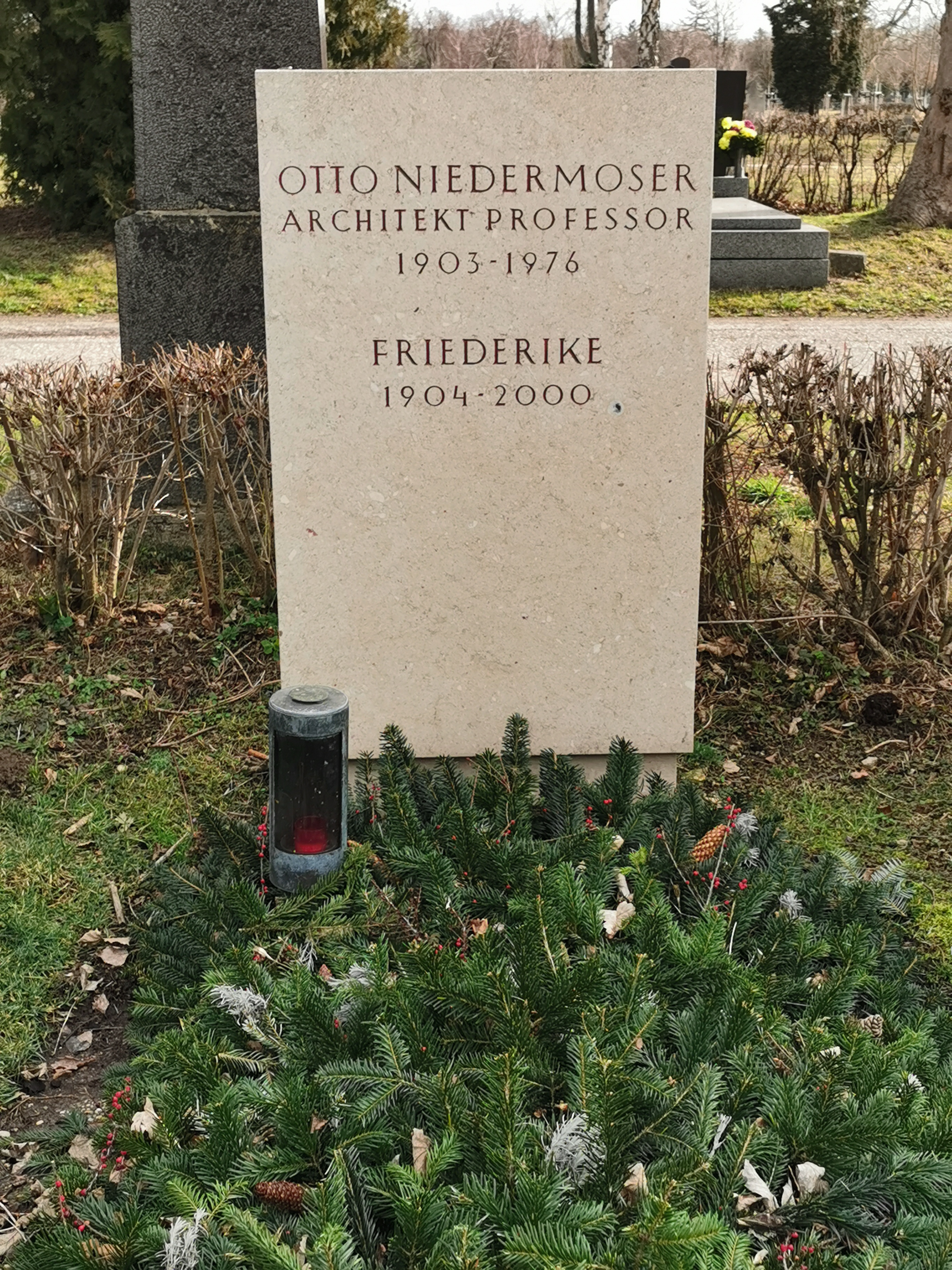 Grab von Otto Niedermoser auf dem Wiener Zentralfriedhof